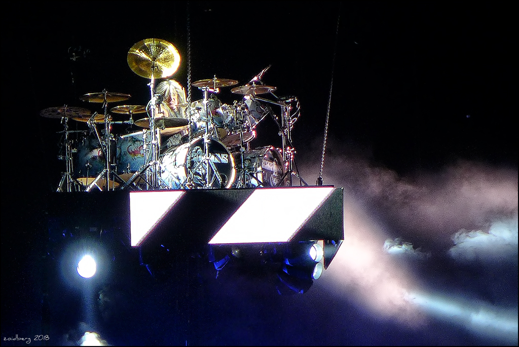 live RockFest, 7-7-2018